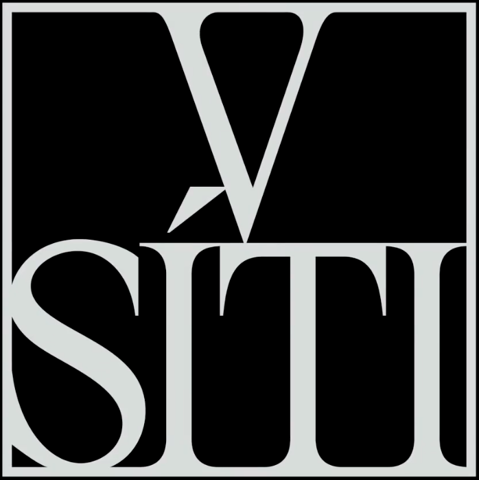 Logo dokumentárního filmu V síti